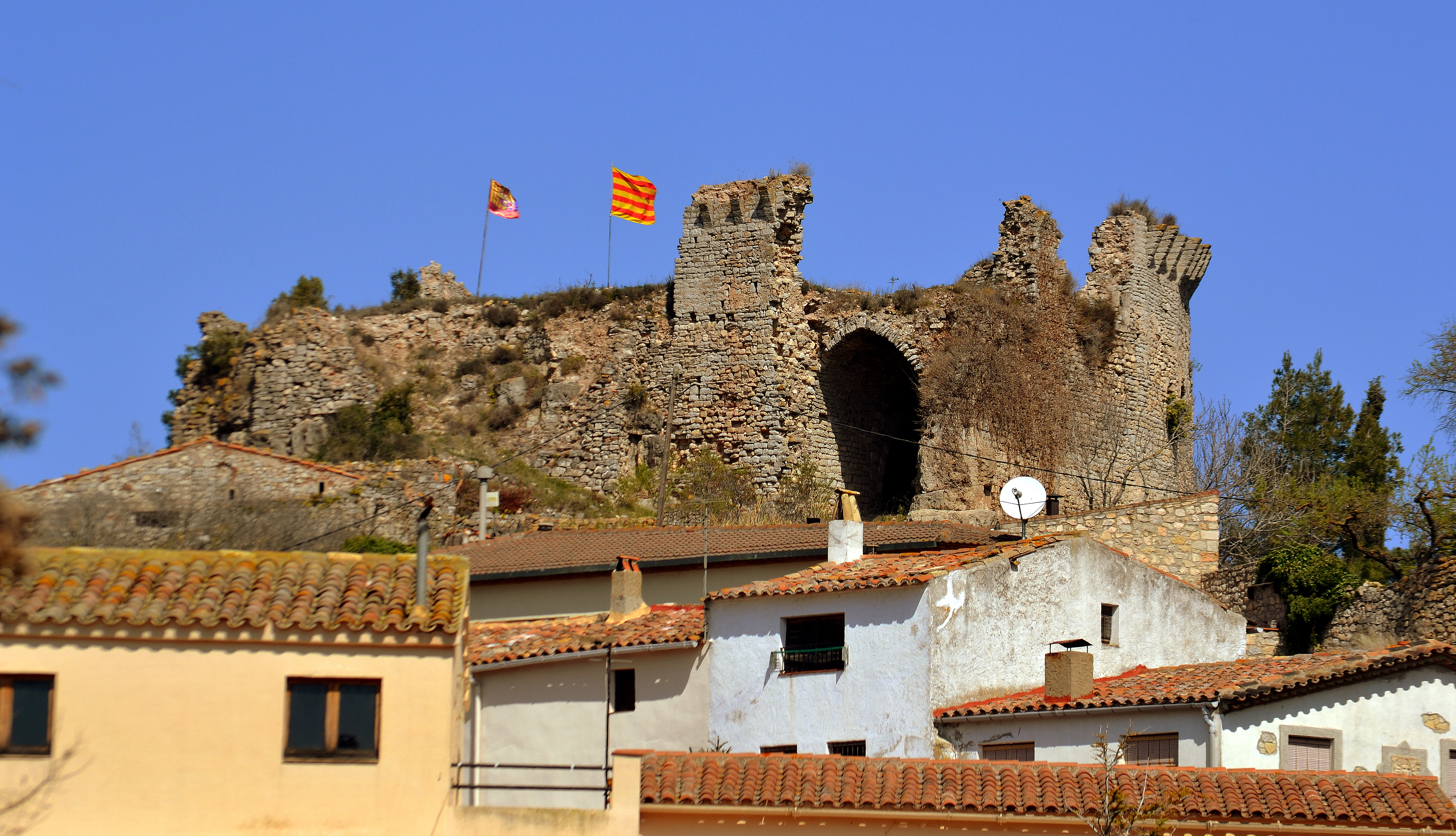 Castell de Querol